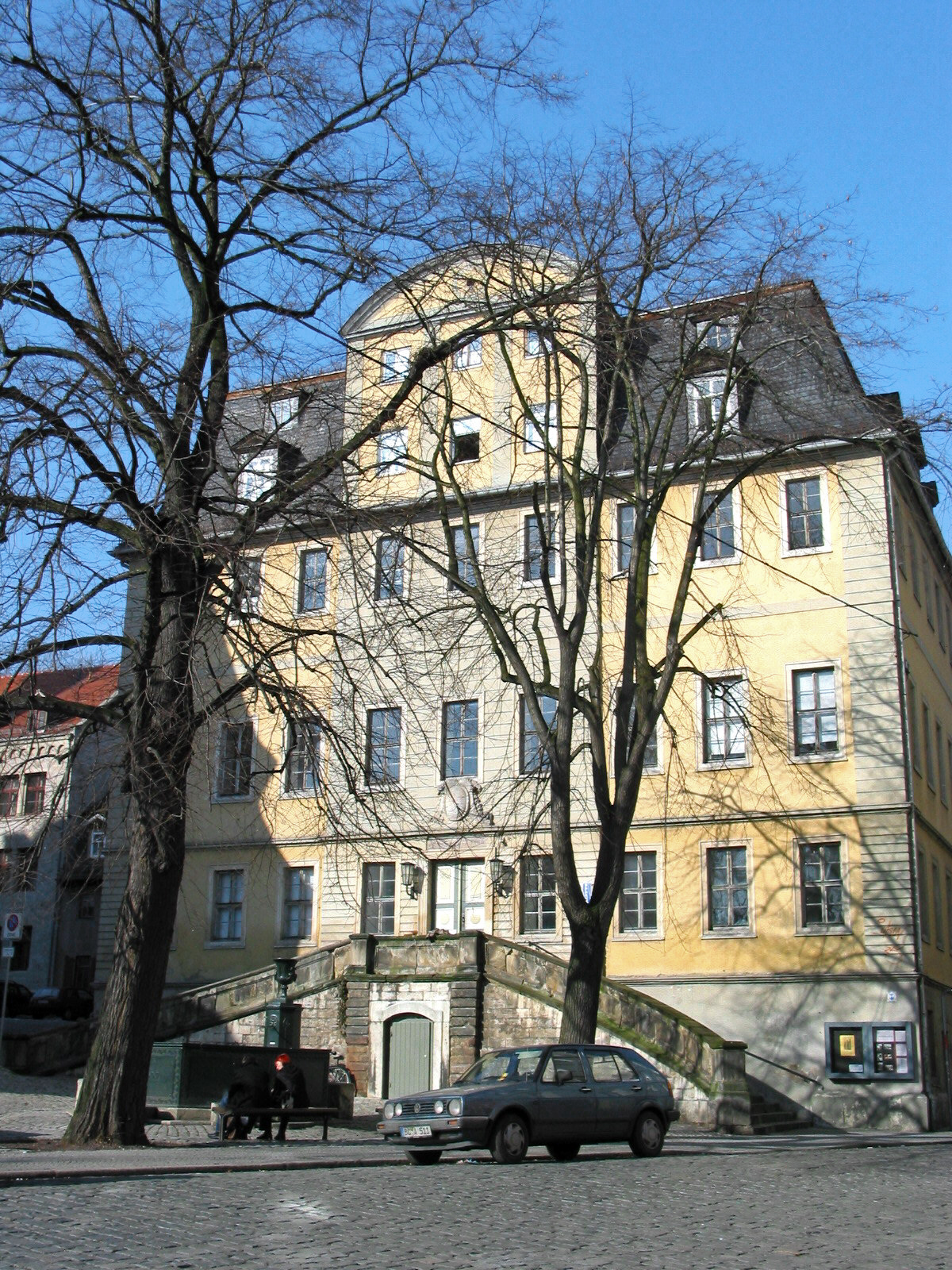 Südansicht des ehemaligen Wilhelm-Ernst-Gymnasiums am Herderplatz in Weimar aus dem Jahre 1716 (auch „Wilhelminum Ernestinum“). Das Schulgebäude wird heute als „Altes Gymnasium Weimar“ bezeichnet und ist als eine von drei Weimarer Herderstätten Teil des Ensembles „Klassisches Weimar“, das 1998 von der UNESCO zum Weltkulturerbe erklärt wurde.